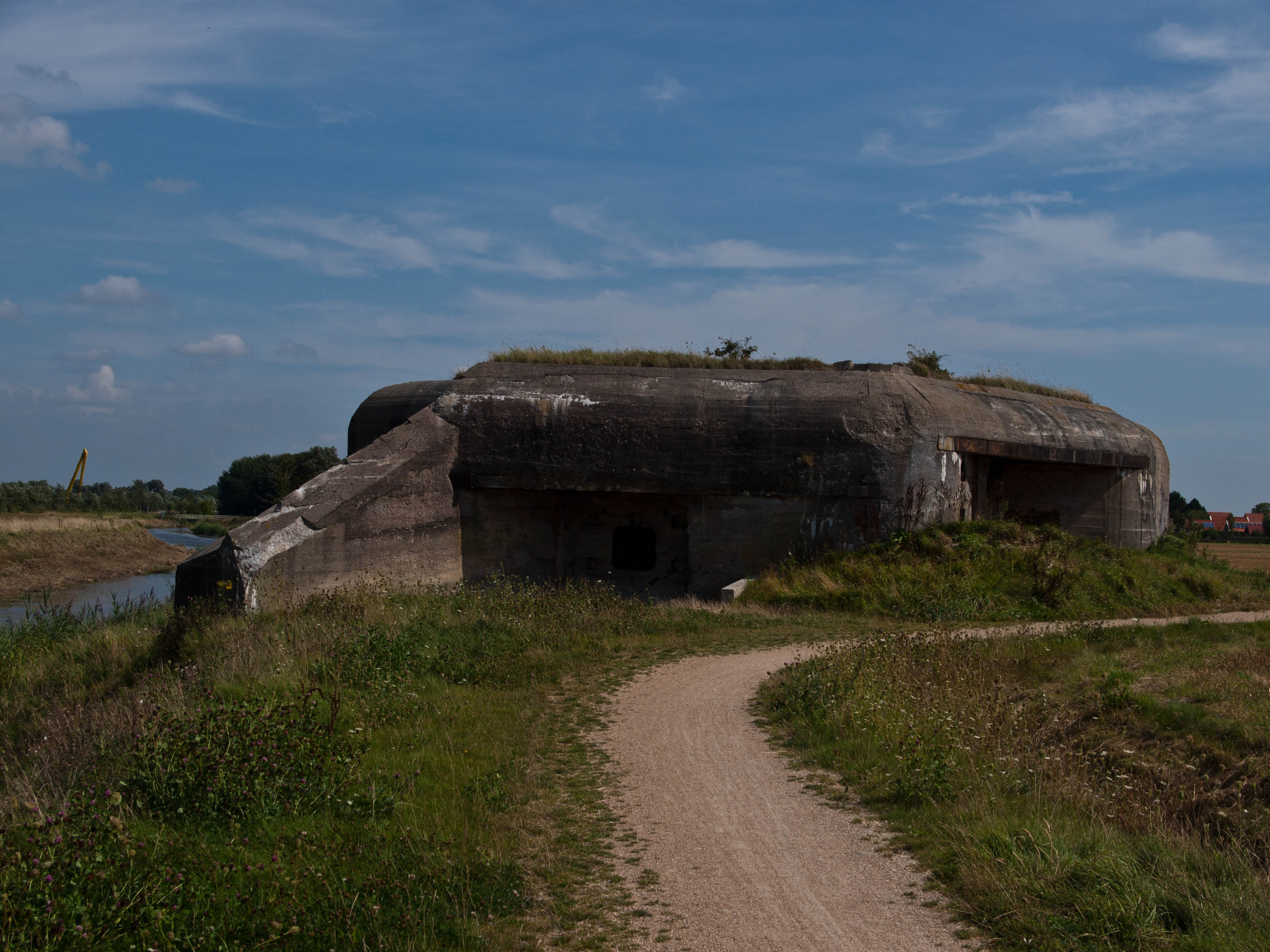 Bunker bij Koudekerke